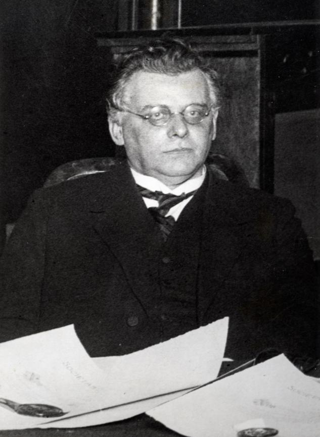 Prof Dr. F.C. Gerretson van de CHU. Geerten Gossaert is het dichterlijk pseudoniem van Carel Gerretson